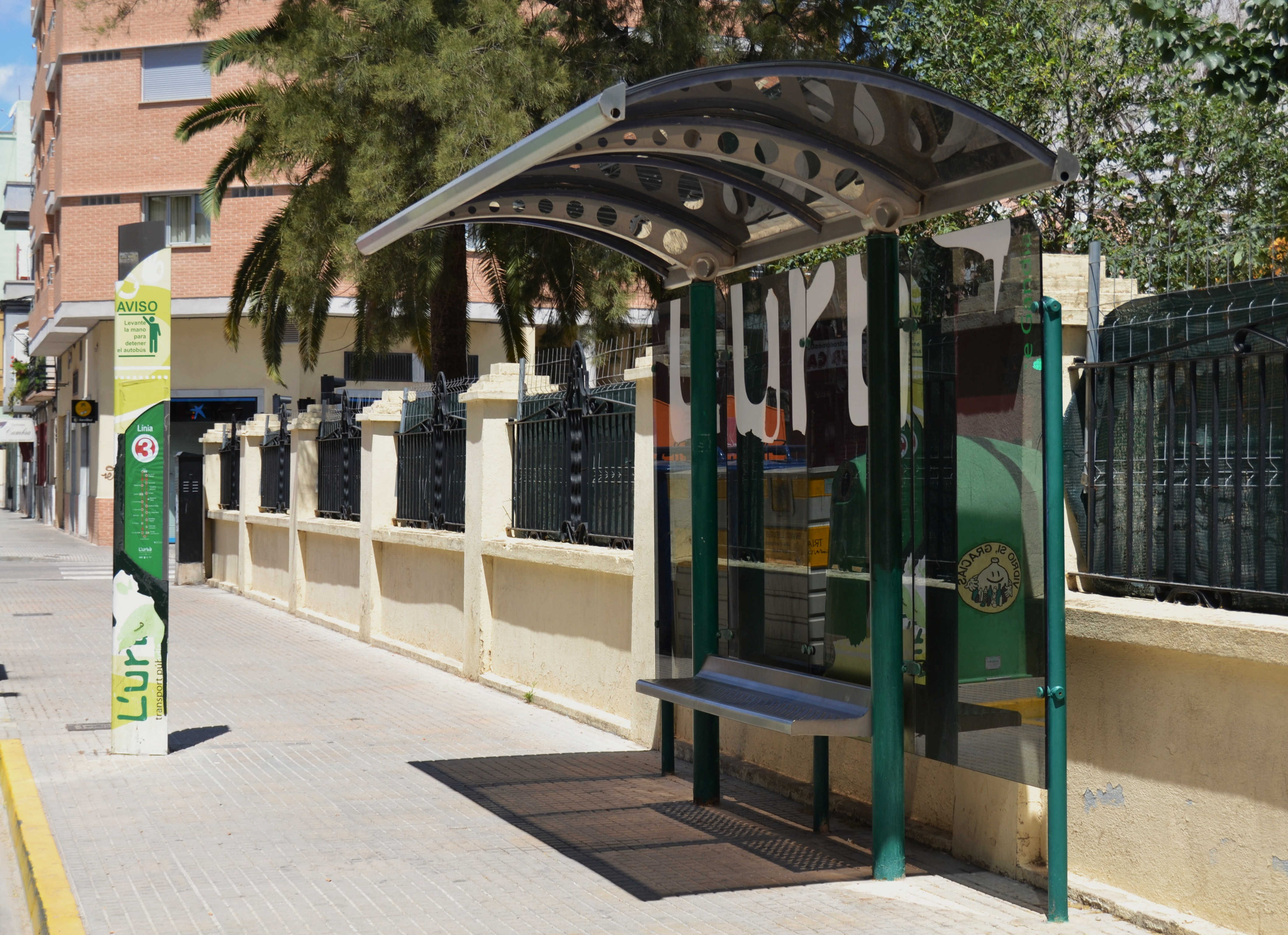 Parada d'autobús a Gandia.